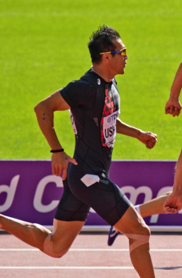 d7_2 vdpl 100m